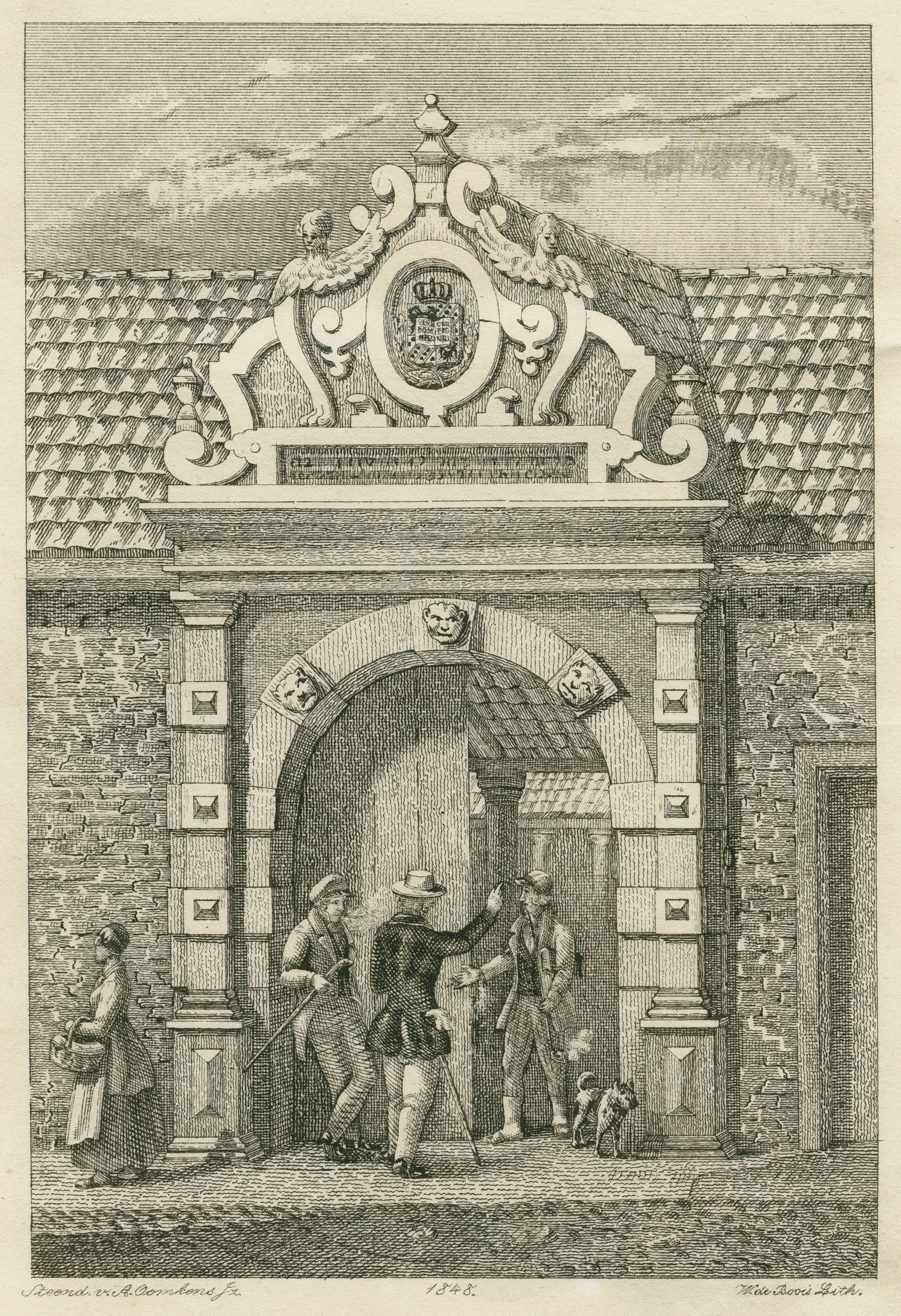 Litho van W. de Boois van de toegangspoort van het oude Academiegebouw in Groningen (1848). Naar een tekening van Jan Ensing (1846).